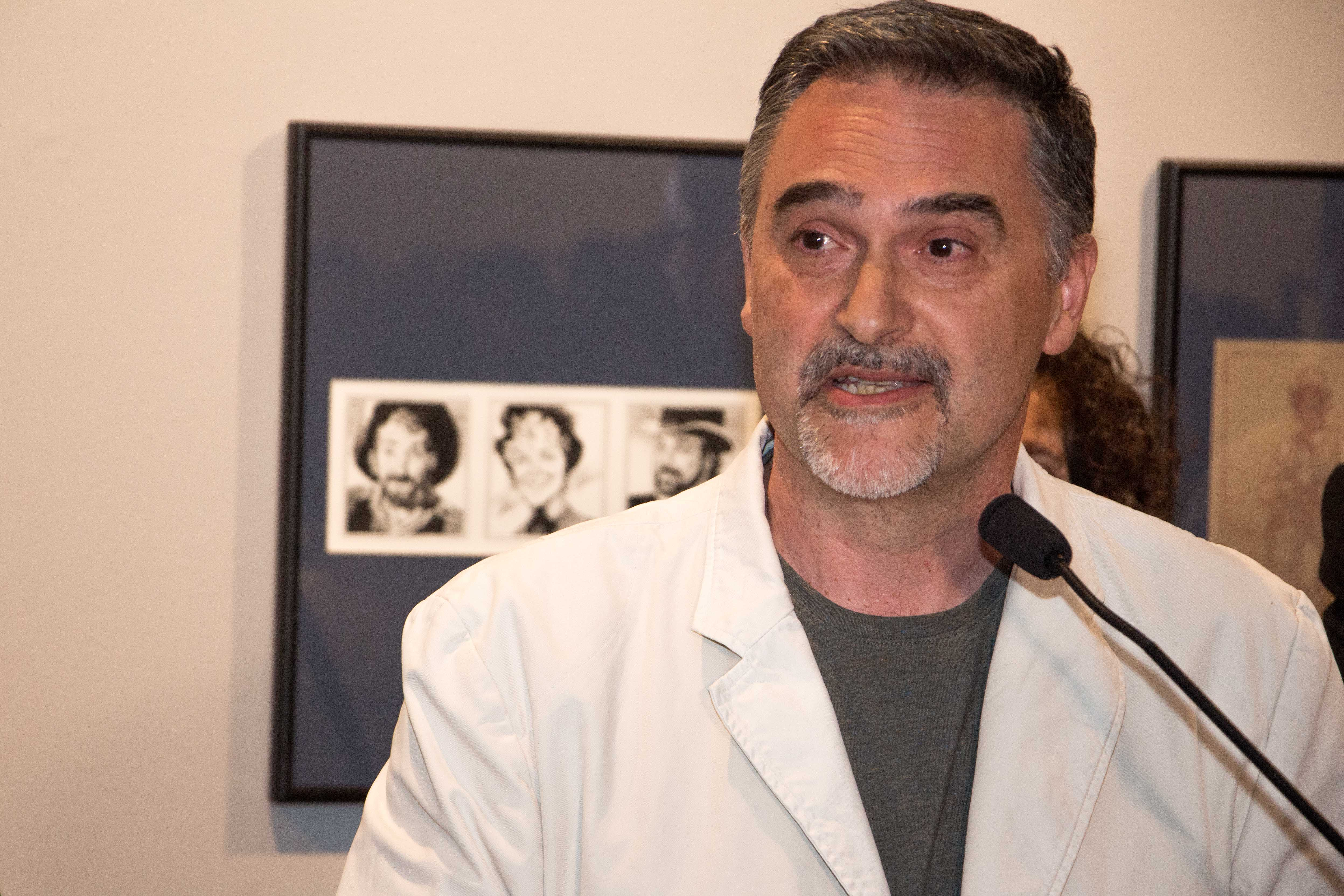 O director do festival Viñetas desde o Atlántico, Miguelanxo Prado, durante a inauguración da edición de 2017